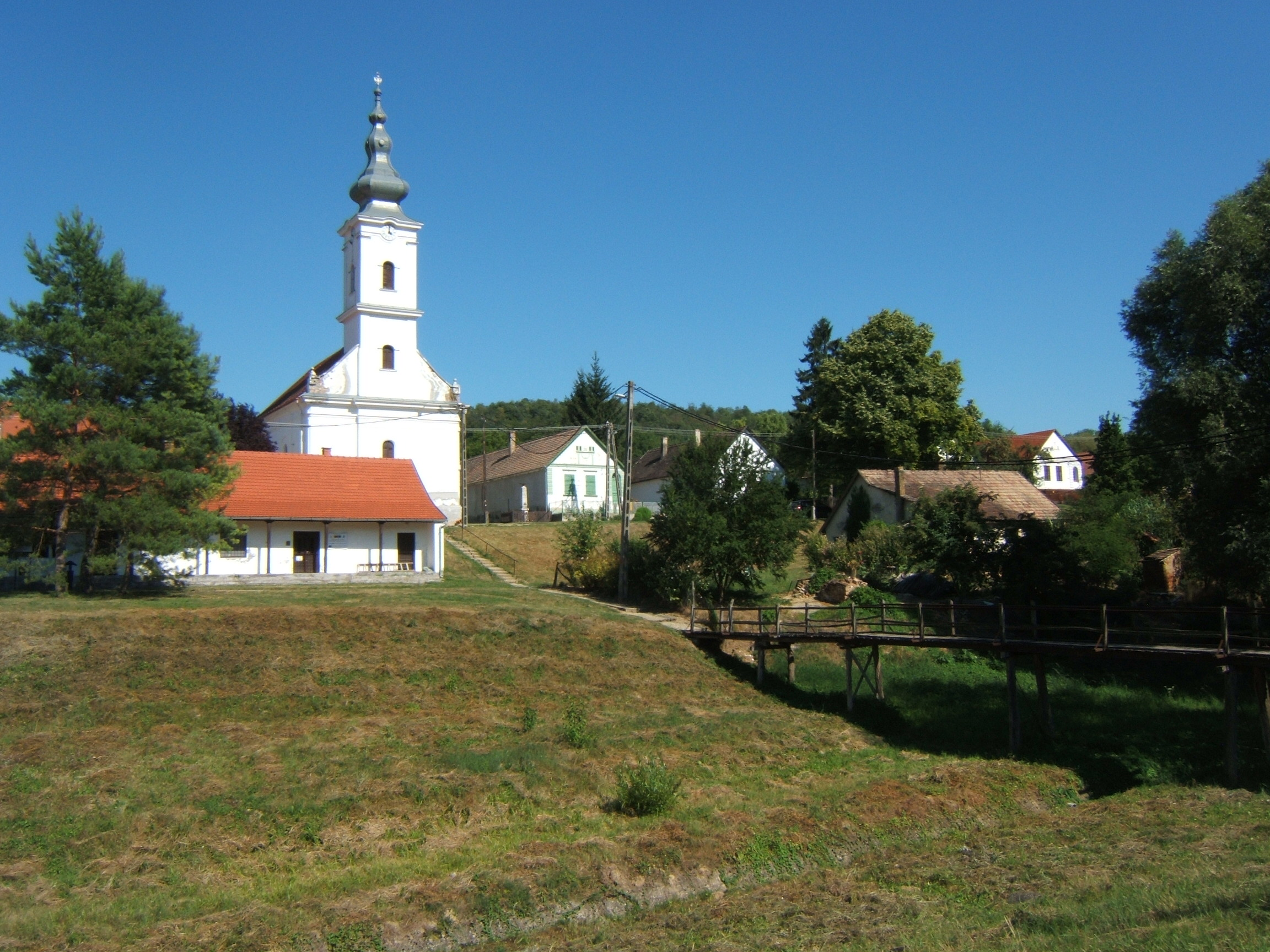 Somogydöröcske, Evangélikus templom?, 1836, barokk. Faluközpont. azonosító 8080 (törzsszám 4634)